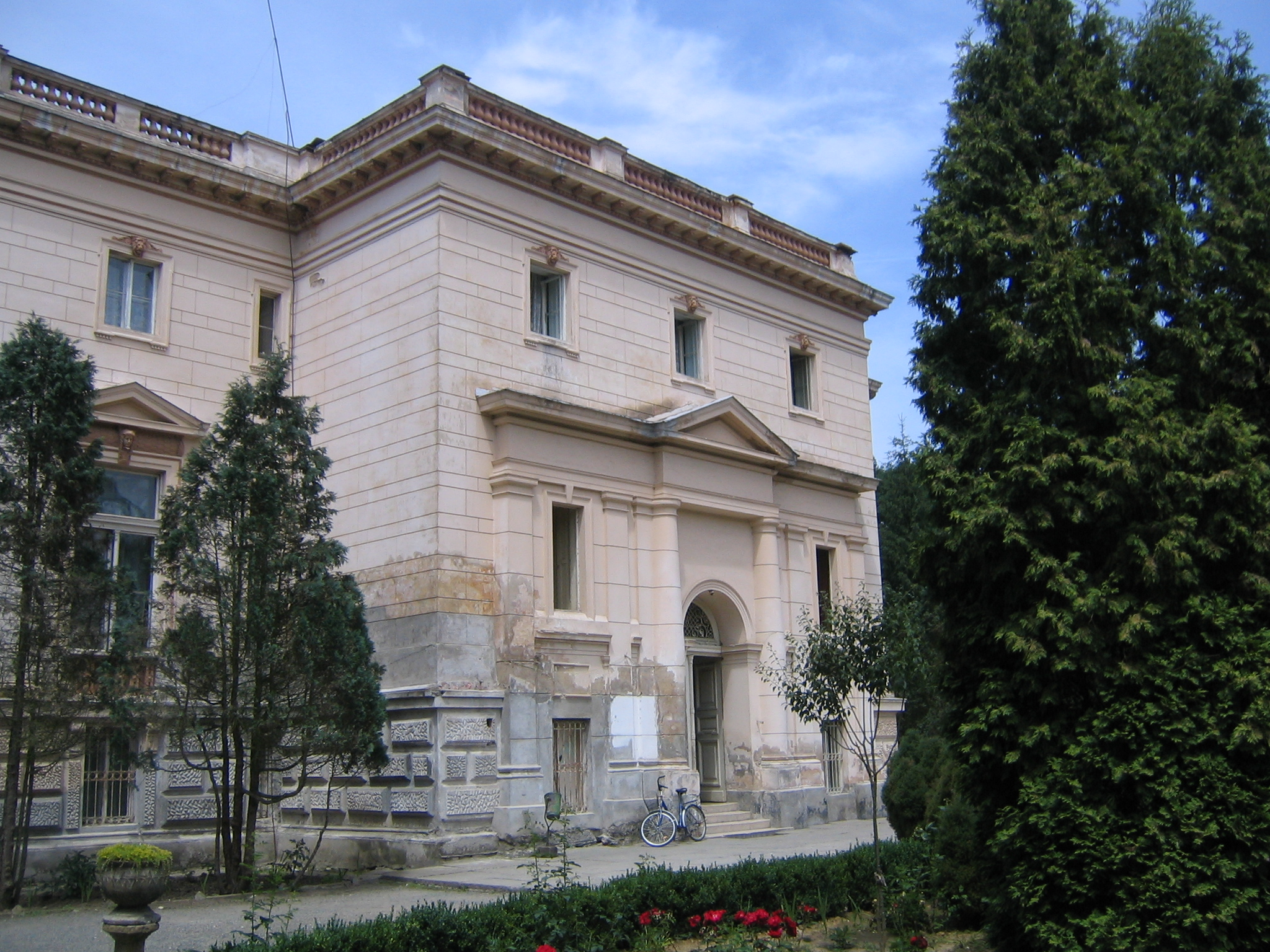 Castelul de la Capalnas, Arad